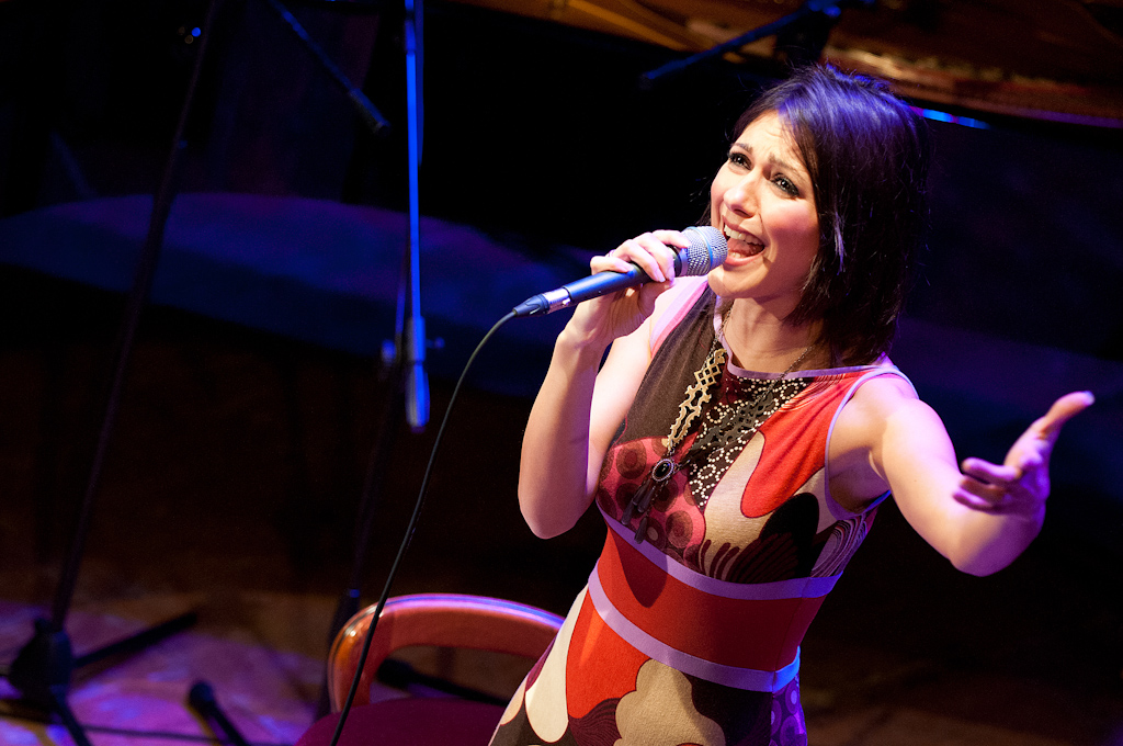 Simona Molinari al Teatro Fenaroli di Lanciano il 28 novembre 2012